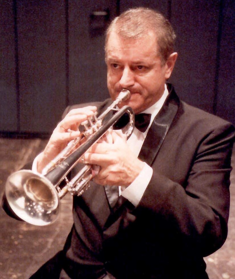 תמונה של נתן בירמן